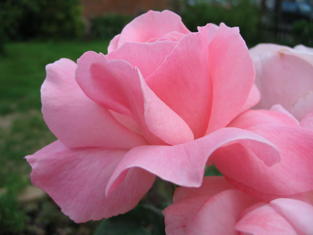 Rosa 'Queen Elizabeth'